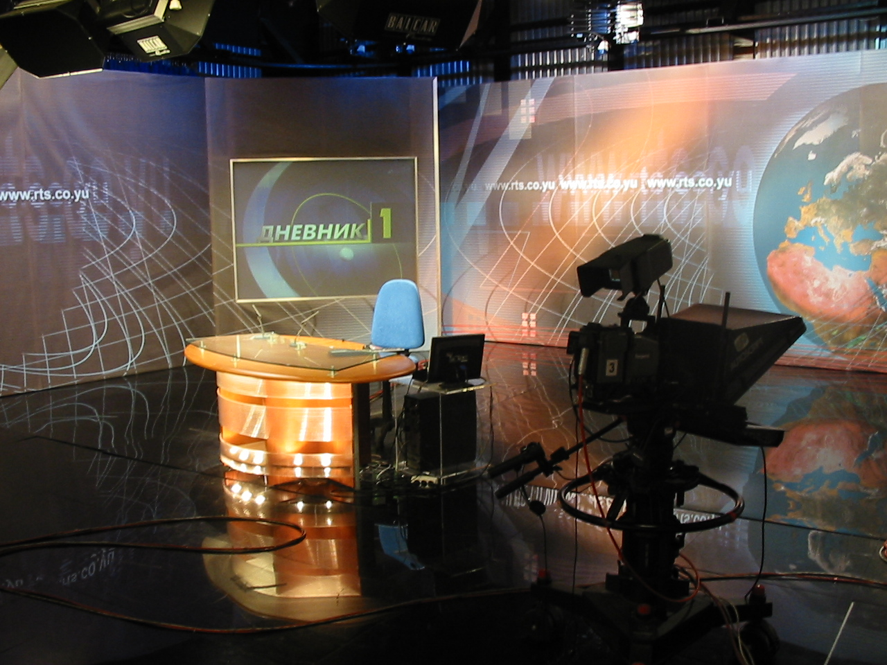 Редакција за историографију (одобрена употреба)